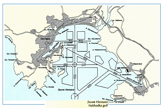 Map of Nakhodka Bay